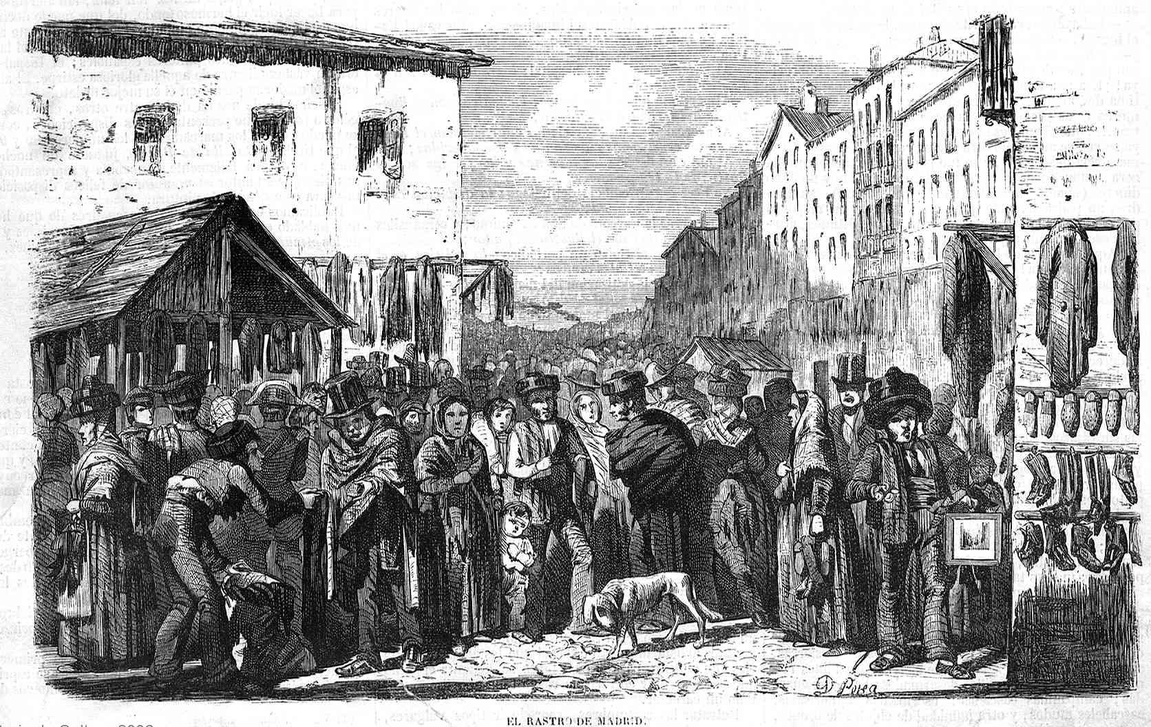 El Rastro de Madrid, en la revista española El Museo Universal.